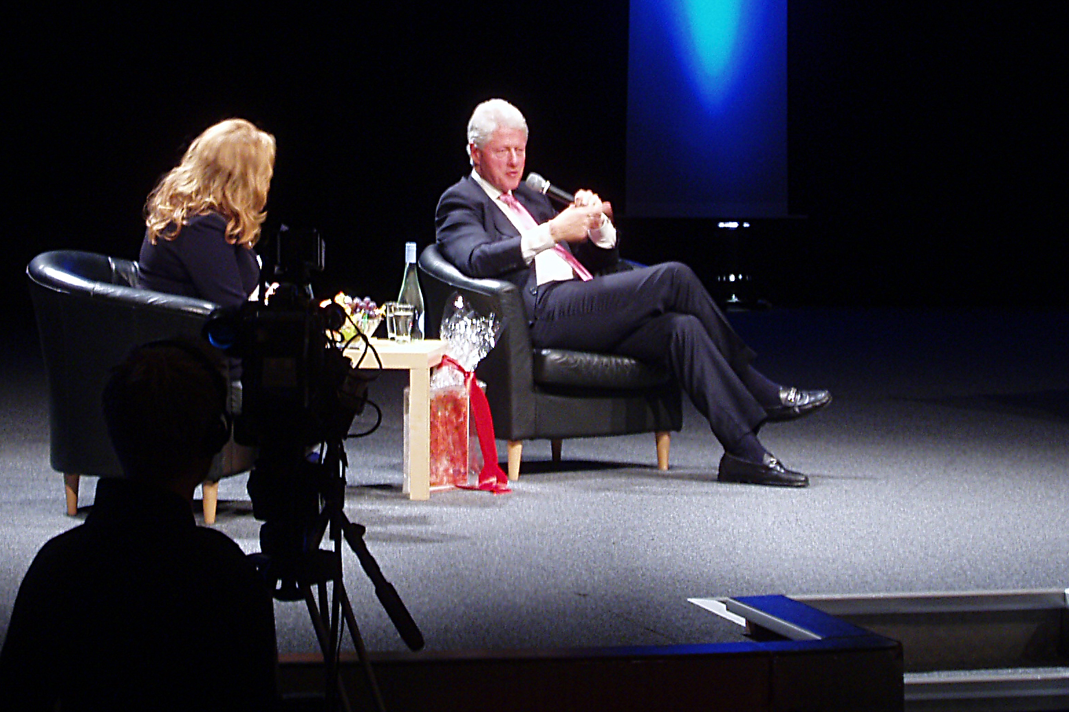 William Jefferson Clinton under ett föredrag i Göteborg, hösten 2007.